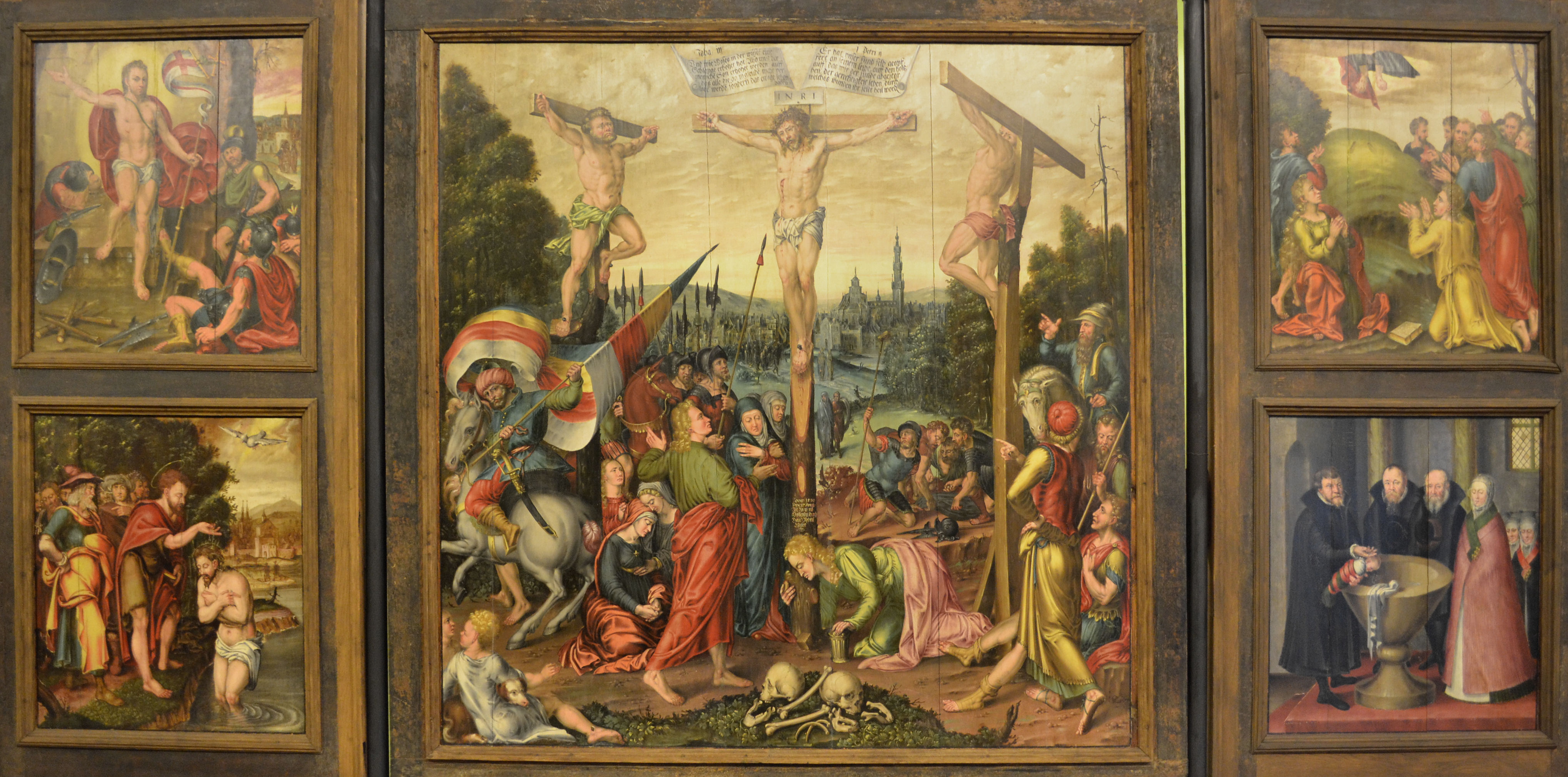 Kościół Narodzenia Najświętszej Maryi Panny w Gryfinie